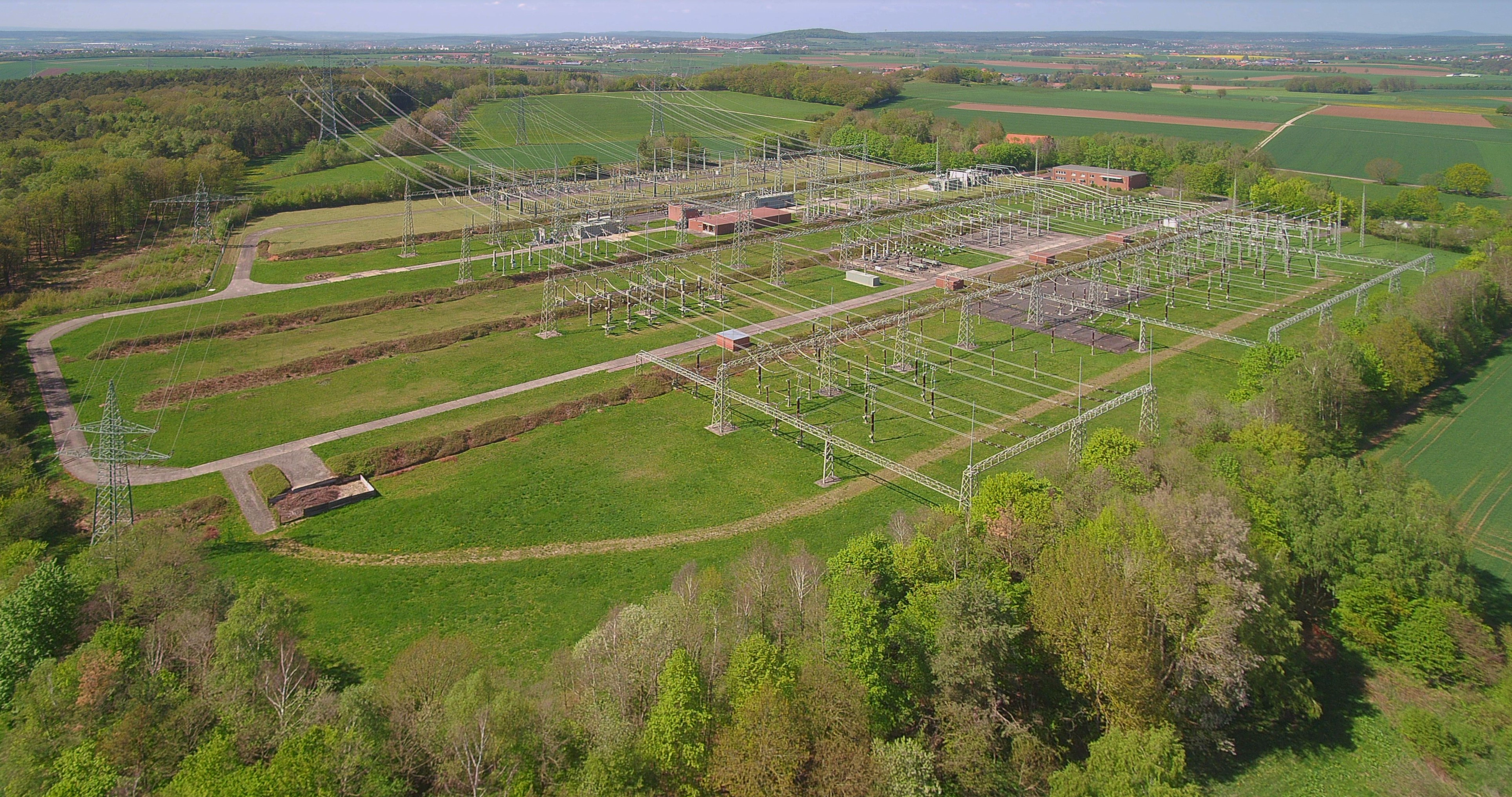 Umspannwerk Dipperz (380/110 kV)